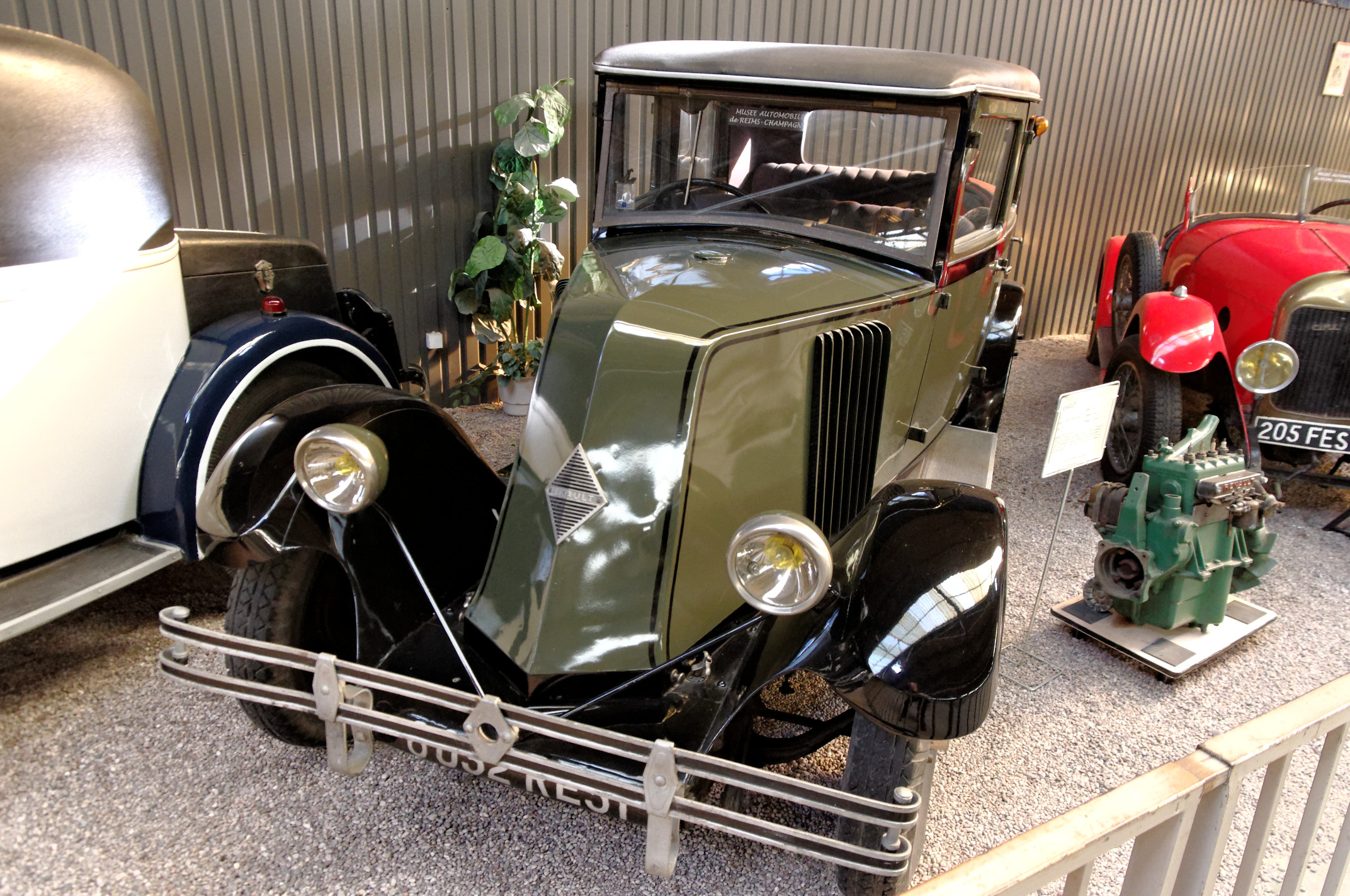 Renault NN 2 (1928), Berline, 4 cyl. en ligne, soupapes latérales, 950 cm3, 6 cv fiscaux, vitesse max. 65 km/h(Musée Automobile Reims Champagne, Reims, Marne, France)